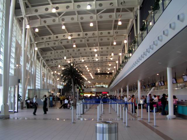 Aéroport Princess Juliana SXM, (intérieur-départ).